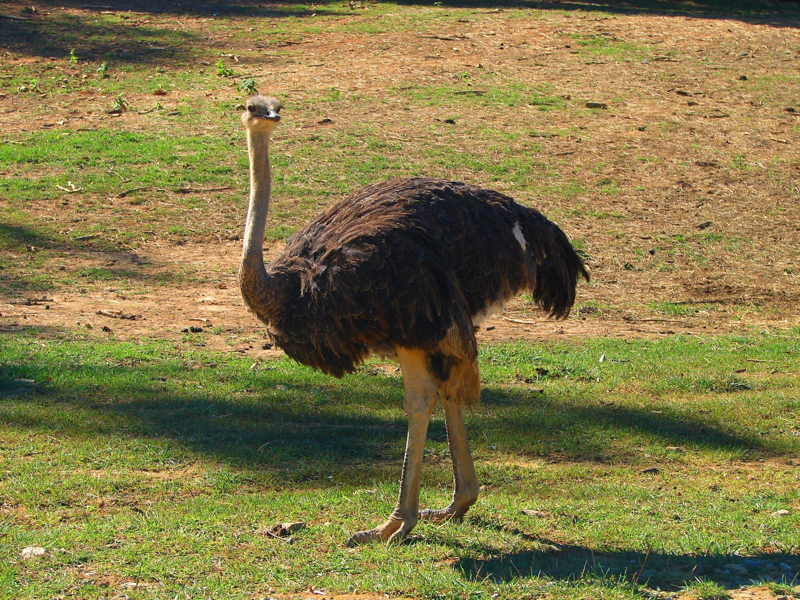 വിർജീനിയ സഫാരിയിൽ നിന്നും.